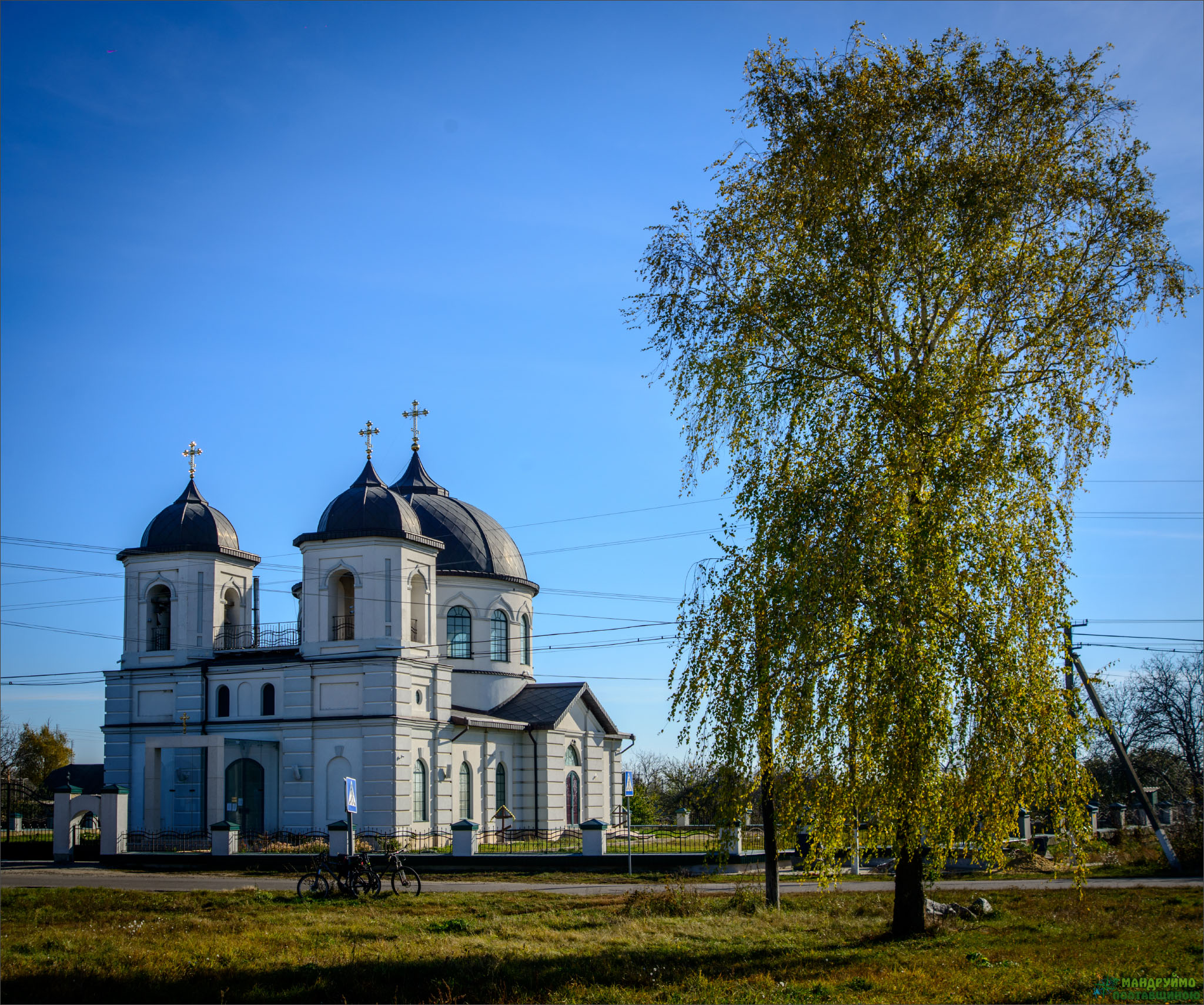 Свято-Троїцька церква. Великі Будища. Велотур"Гадяч - Полтава"